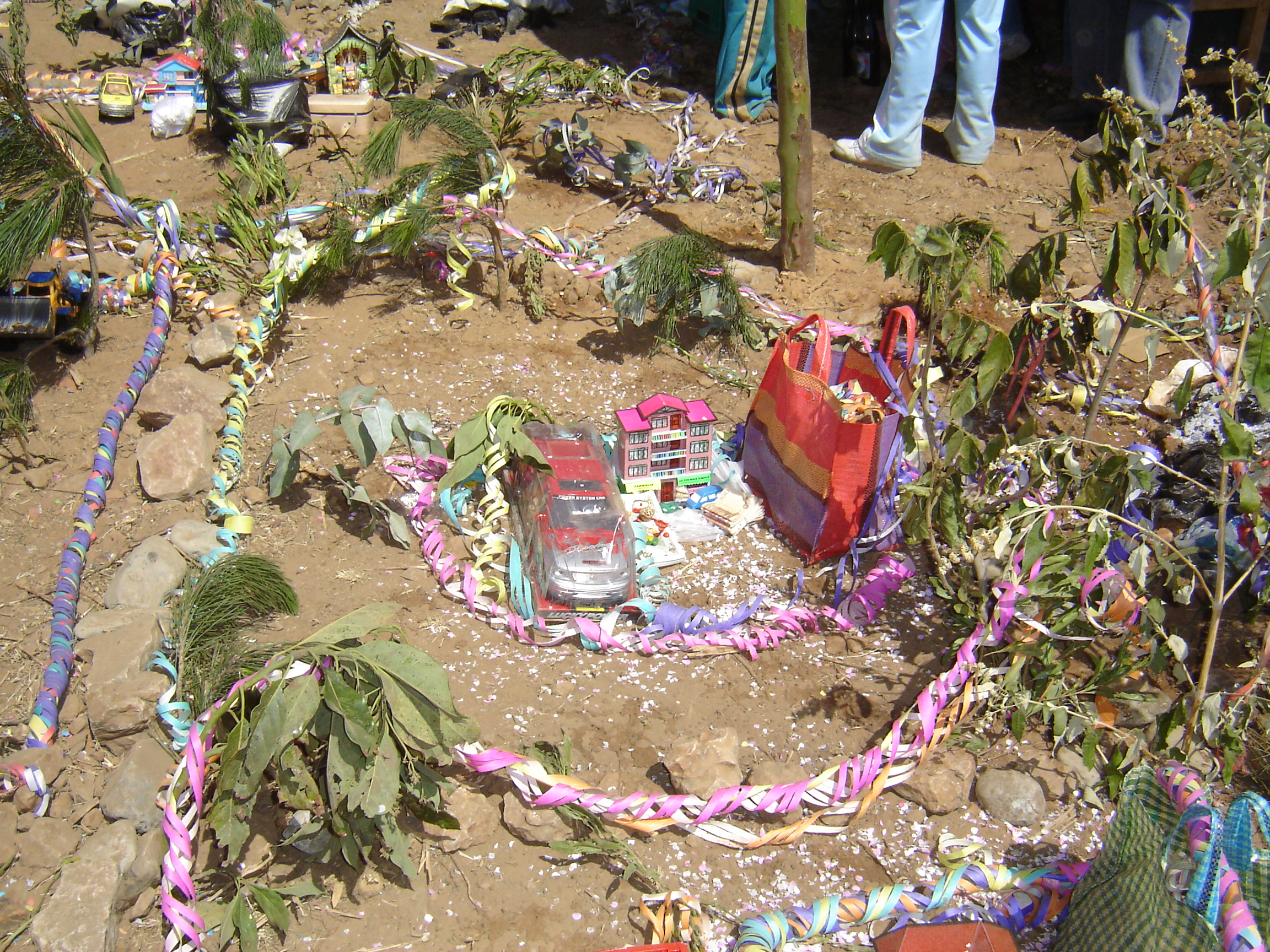 Venta de lotes de terreno en el Calvario de la Virgen María de Urqupiña, donde los devotos compran de manera simulada con la esperanza de que el próximo año o más adelante tendrán un terreno o casa propia con la ayuda de la Virgen María de Urqupiña. Runa Simi: Jallp'a luti ranqhay Urqupiñamanta Llump'aq Mariyaq Kalwariumpi, chaypi iñiqkuna rantinku phuqllaypi chayri tukuypi jina suyaspa watanpaq sut'inmanta jallp'ayuq chayri wasiyuq kanankupaq Urqupiñamanta Llump'aq Mariyaq yanapanwan.